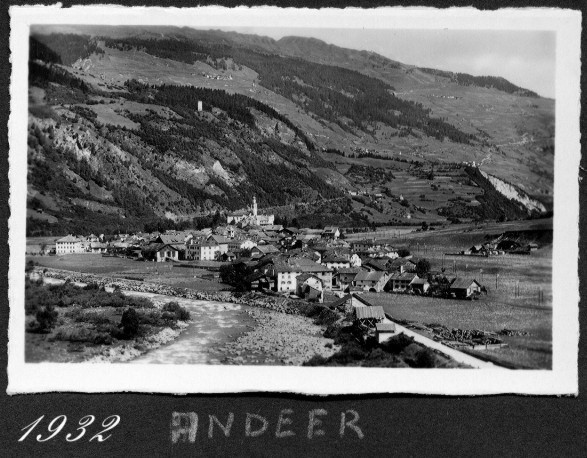 Andeer, Graubünden, Switzerland